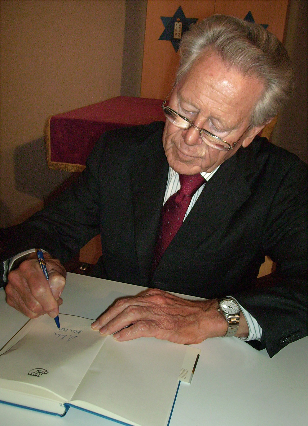 Hans Küng in der Synagoge (Hechingen) am 2. März 2009